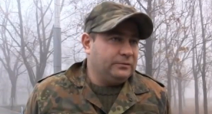 Андрій Дзиндзя, журналіст, активіст «Дорожнього контролю» та Євромайдану, боєць полку міліції особливого призначення «Азов», в ефірі програми "Подробиці".